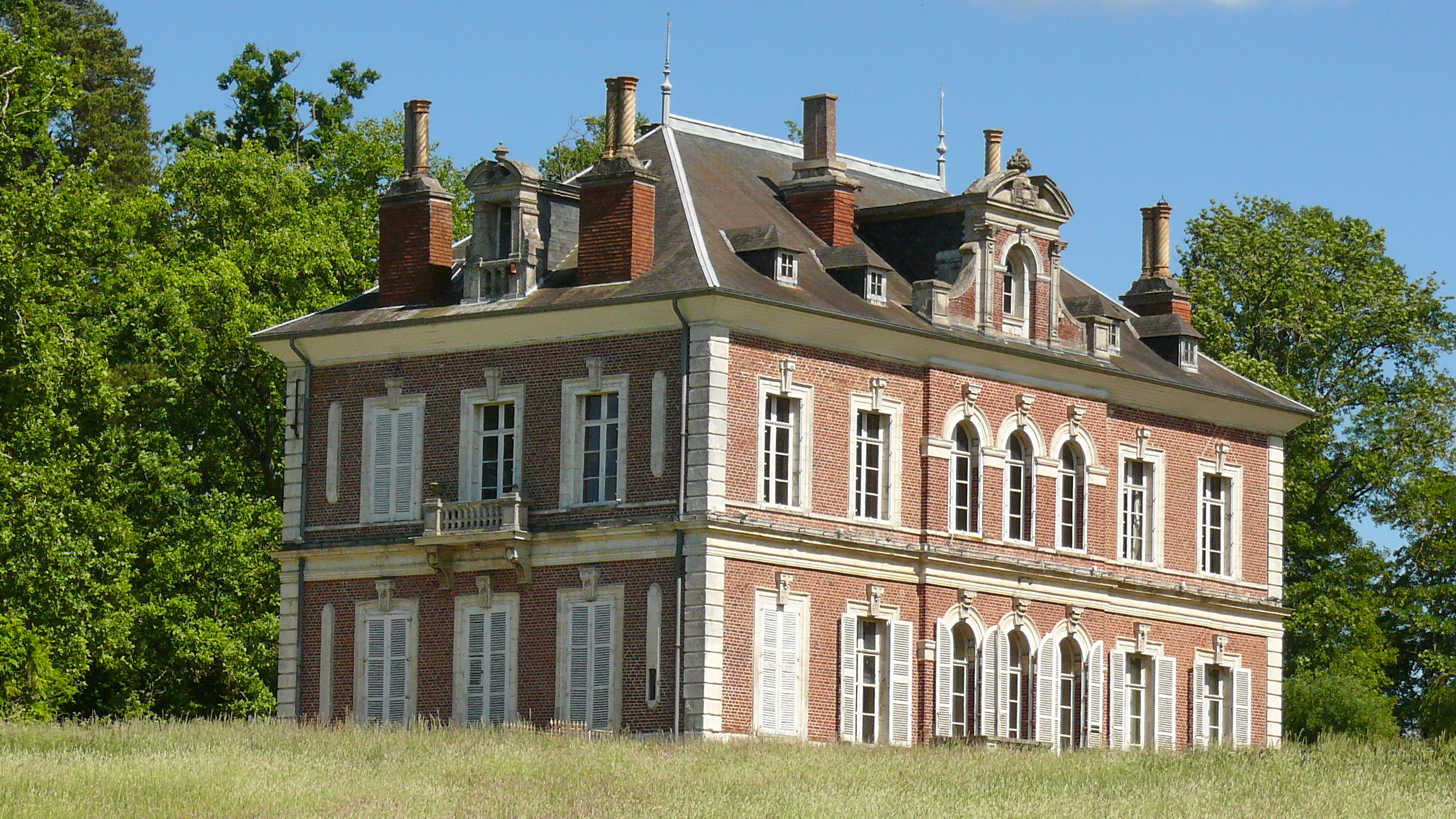 Thieulloy-la-Ville : Le Château